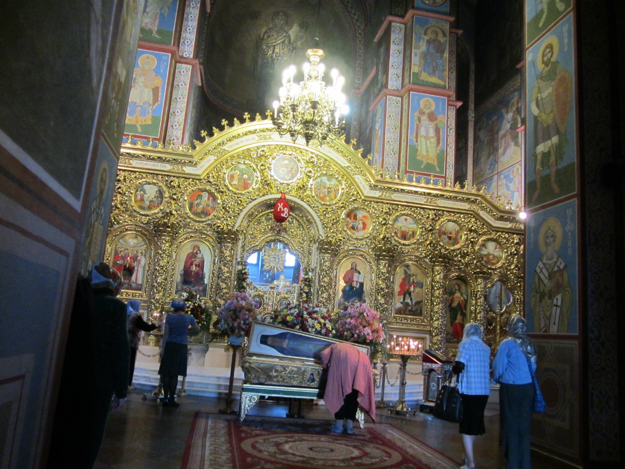 Мощі Преподобного Меркурія у Михайлівському Монастирі